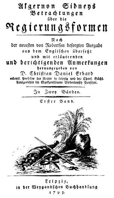 Algernon Sidney (1622-1683)